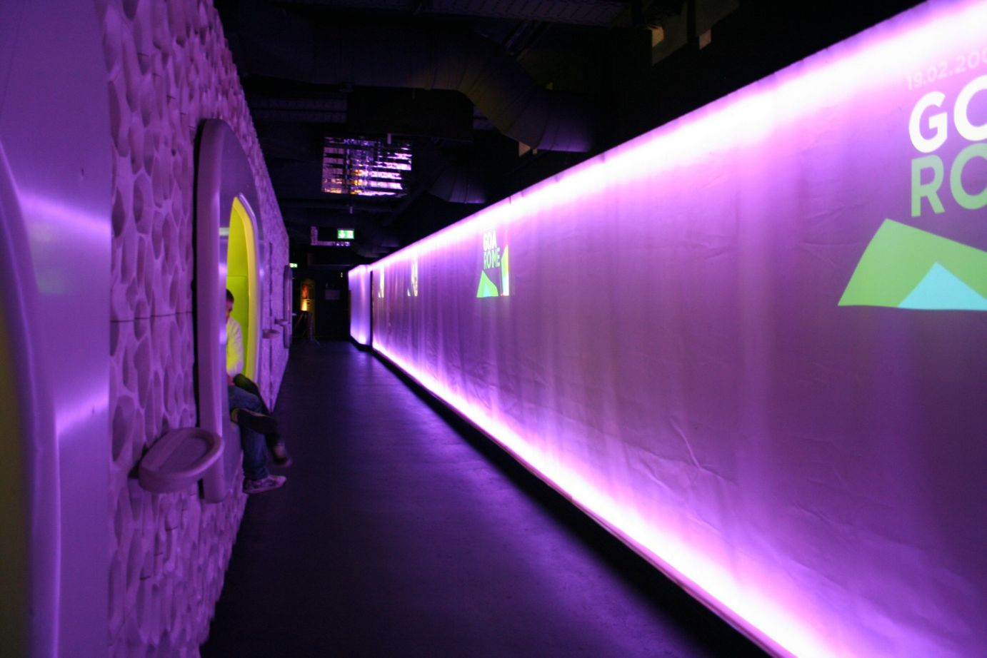 Ein Rundgang mit Bildprojektionen im Frankfurter Cocoon-Club